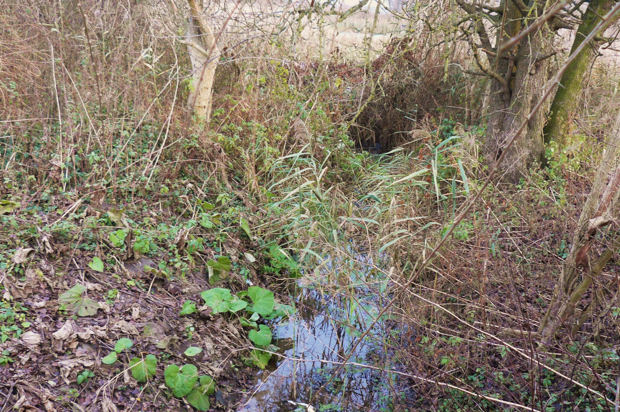 Dworski Rów river - Poznań (Spławie).